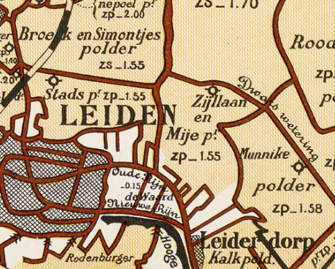 Zijllaan_en_Meijepolder